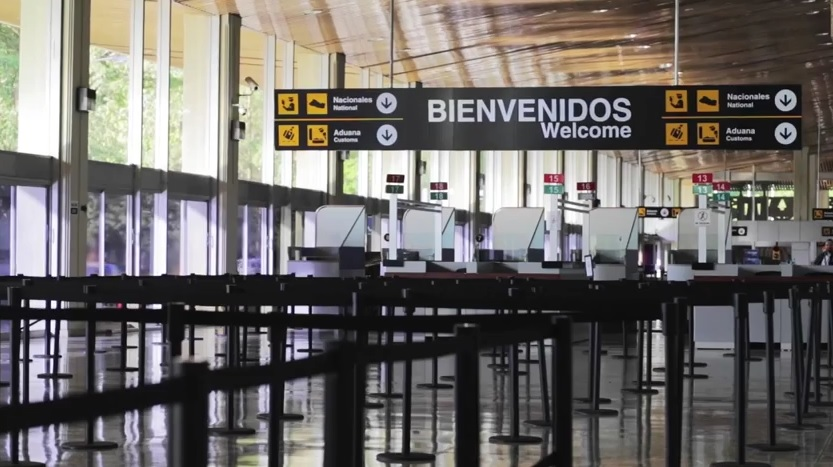 Área de llegadas en aeropuerto